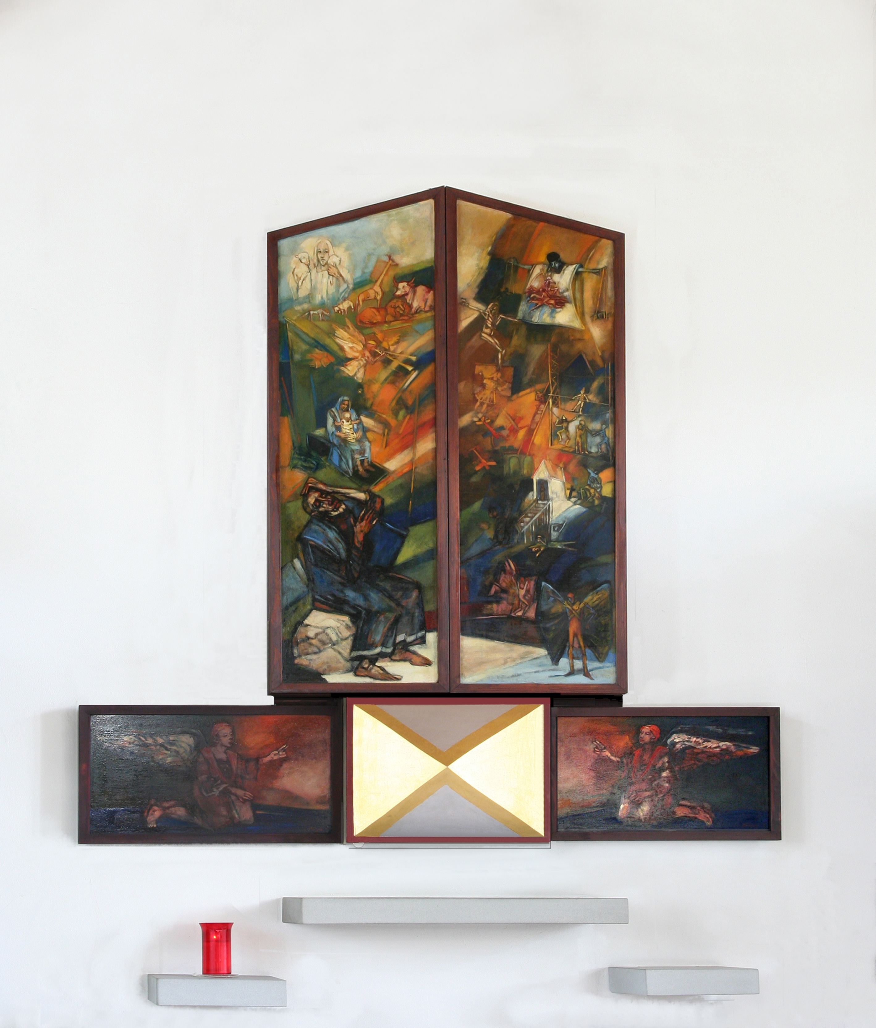 Römisch-katholische Pfarrkirche St. Judas Thaddäus Eglisau, Altar von Ágnes Máger